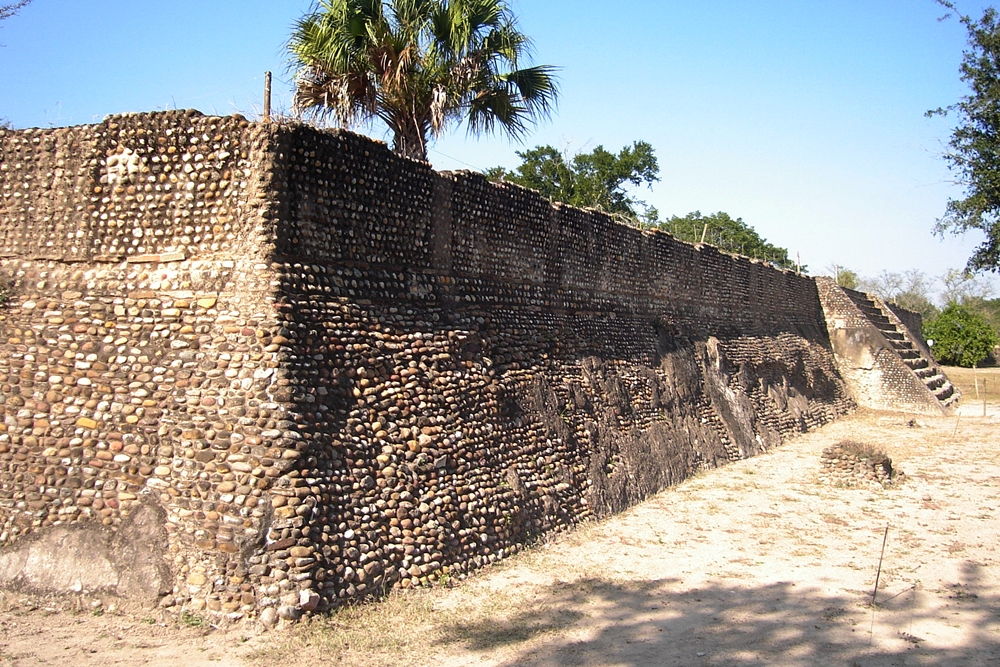 Zona Arqueologica "Tamohi", unicada en el municipio de Tamuin, S.L.P., Mexico